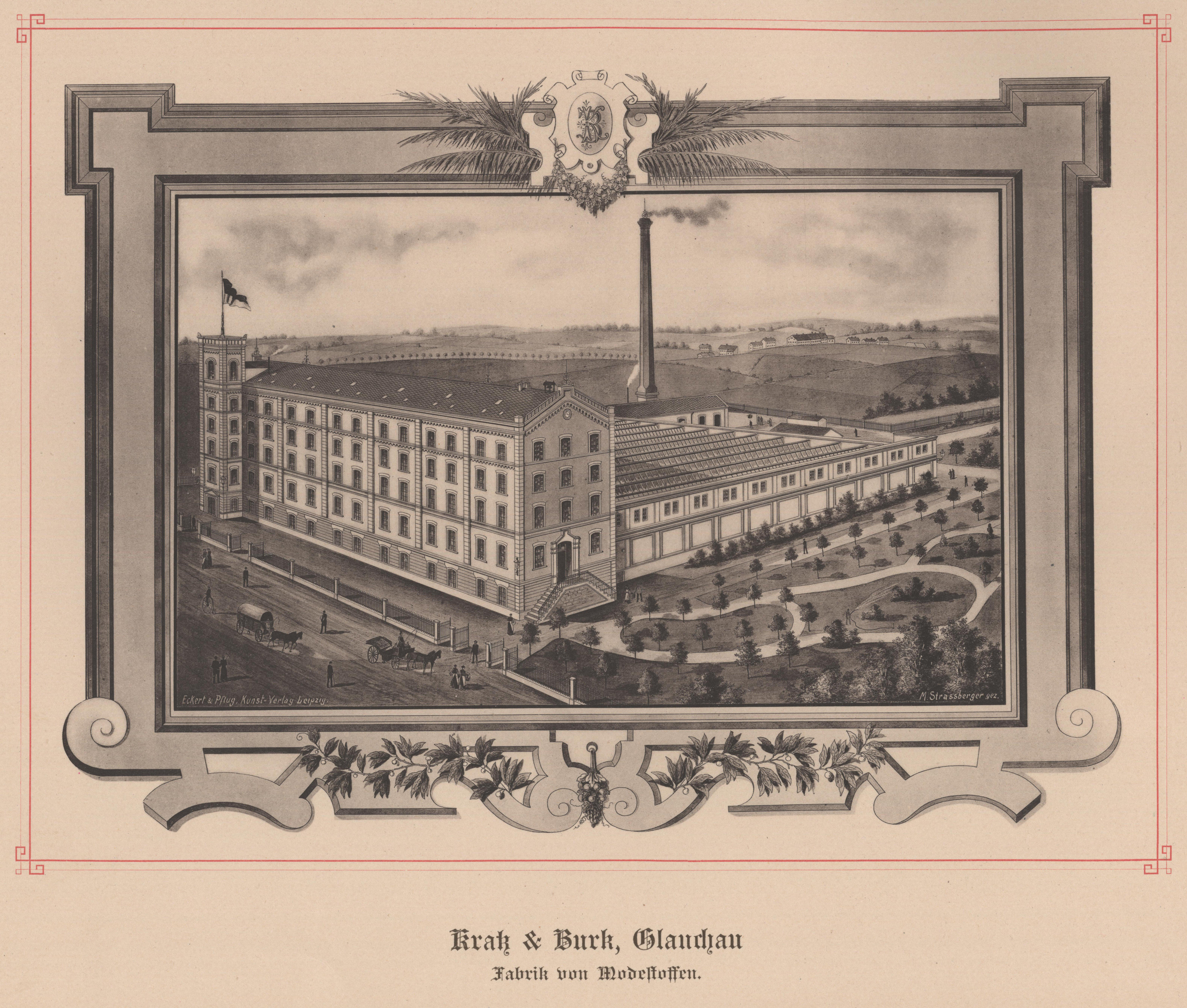 Kratz & Burk, GlauchauFabrik von Modestoffen aus: Die Groß-Industrie des Königreichs Sachsen in Wort und Bild Zweiter Teil